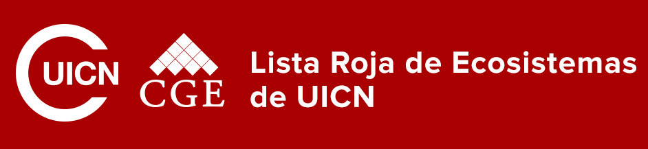 LRE Producto clave, UICN/CGE